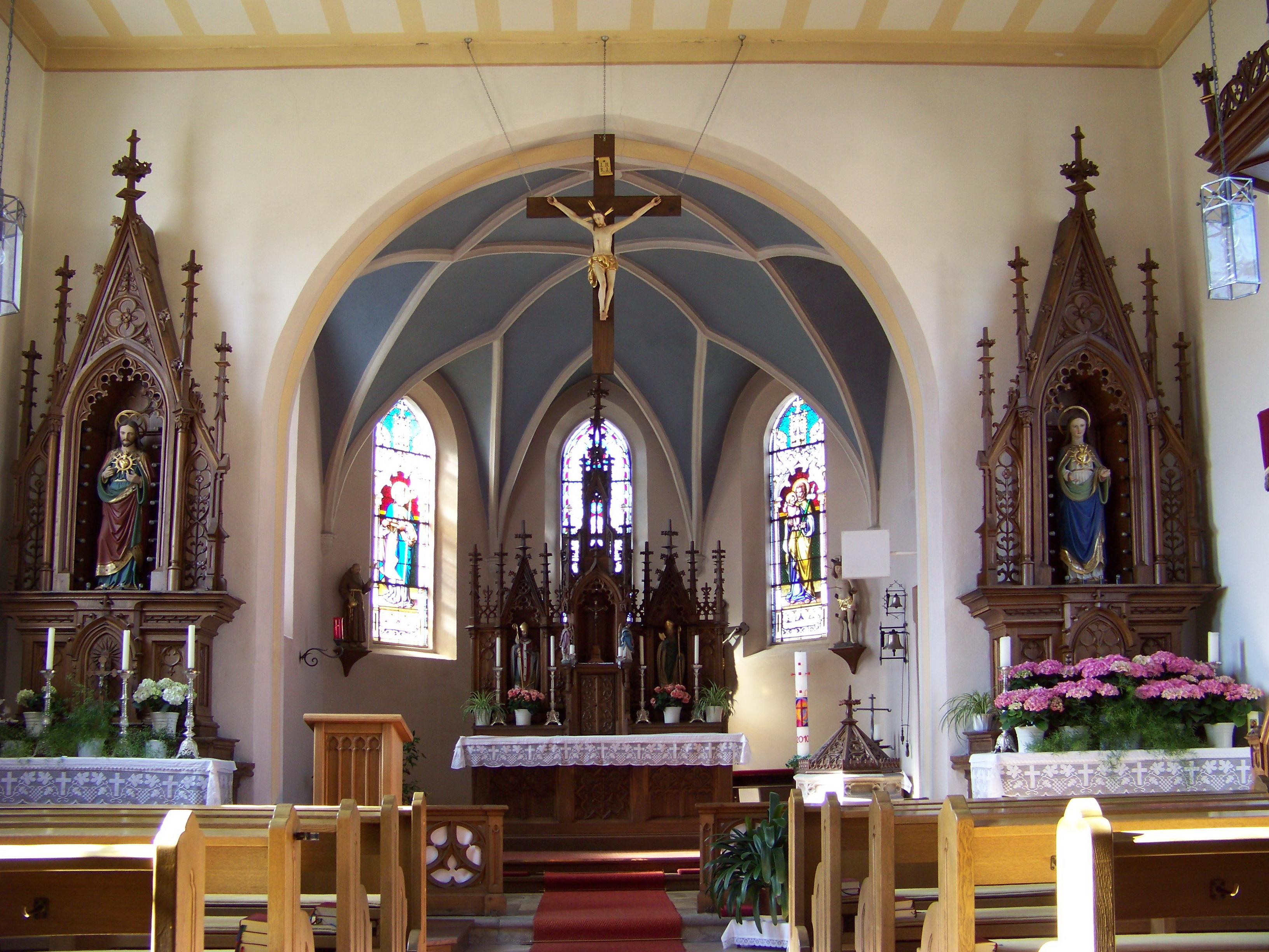 Laberweinting, Franken 13, katholische Expositurkirche St. Nikolaus. Das Langhaus ist mit einer Neo-Renaissancedecke flach gedeckt. Netzgewölbe im Chor, der mit drei Seiten eines Achtecks schließt. Die Ausstattung ist neuromanisch. Im Chorbogen Kreuz.